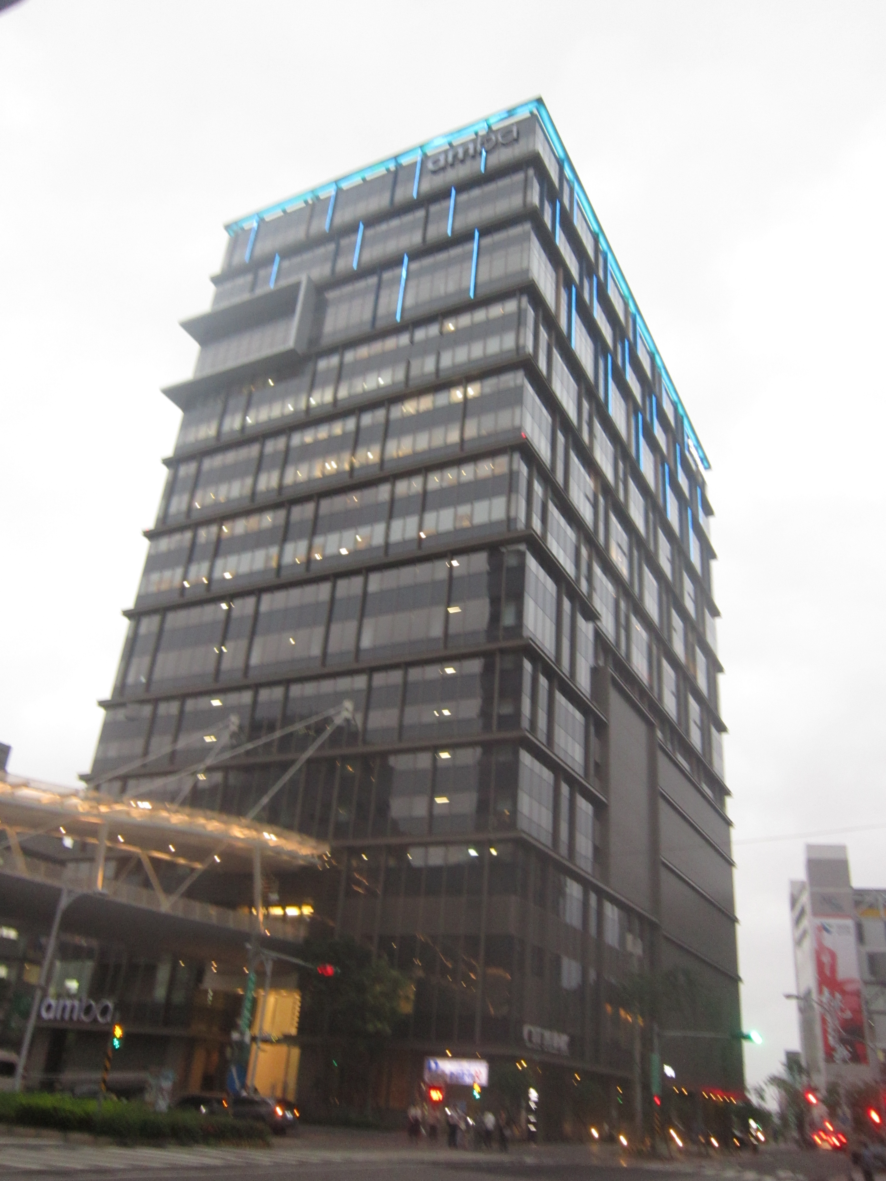 國賓大飯店台北松山意舍酒店，位於潤泰松山車站大樓1樓。